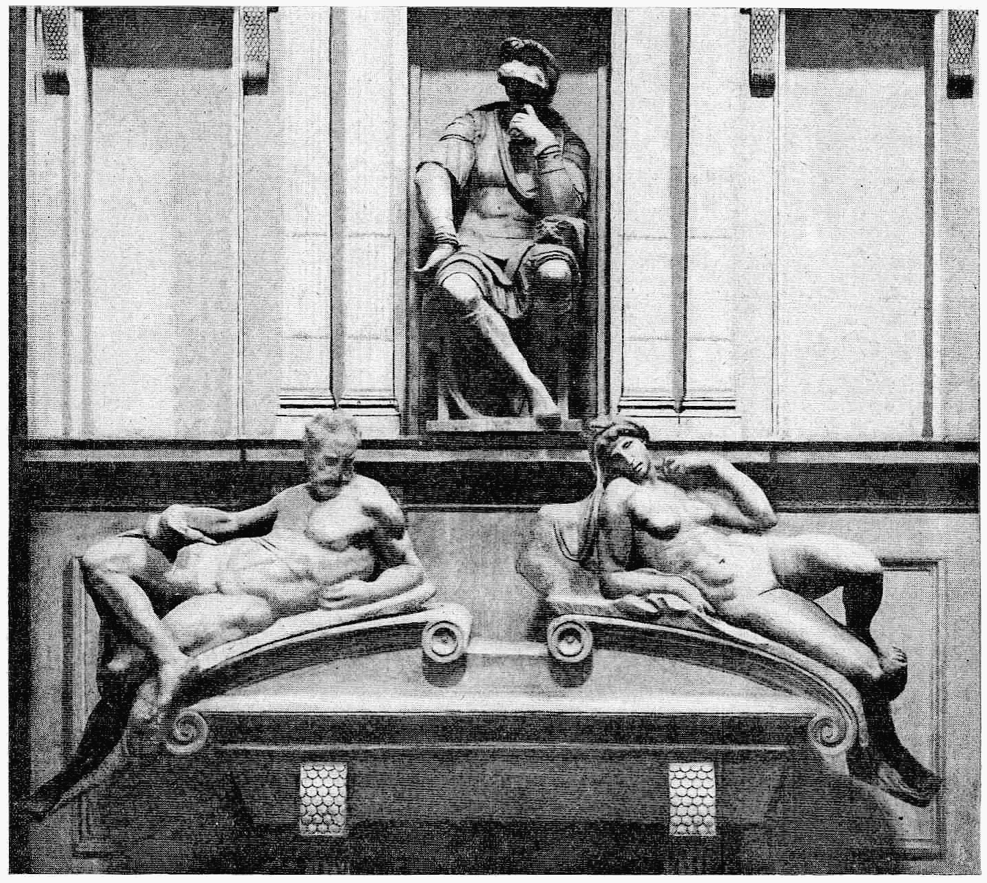 florence. tombeau de lorenzo de medici